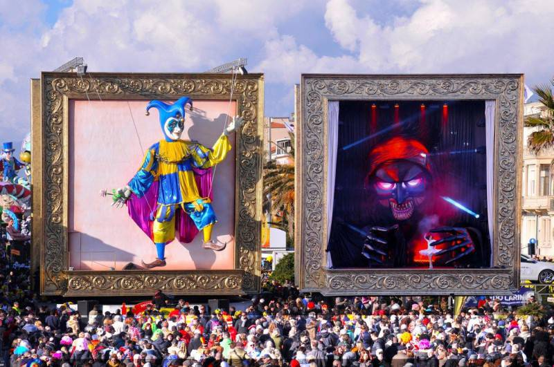 Foto